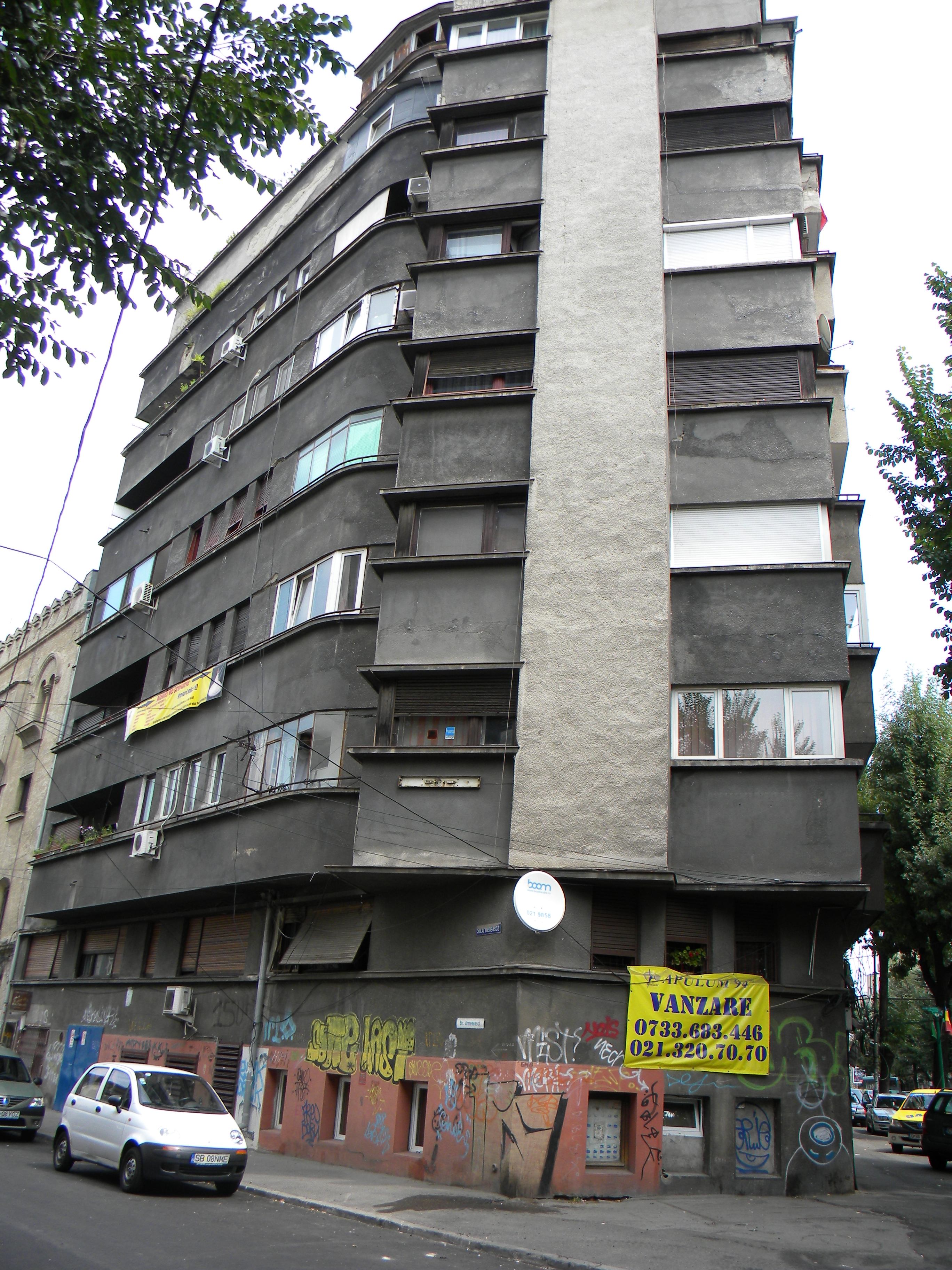 Bucuresti, Romania, Imobil pe Str. Armeneasca nr. 10 (intrarea pe Str. Carol I nr. 45); B-II-m-B-18002